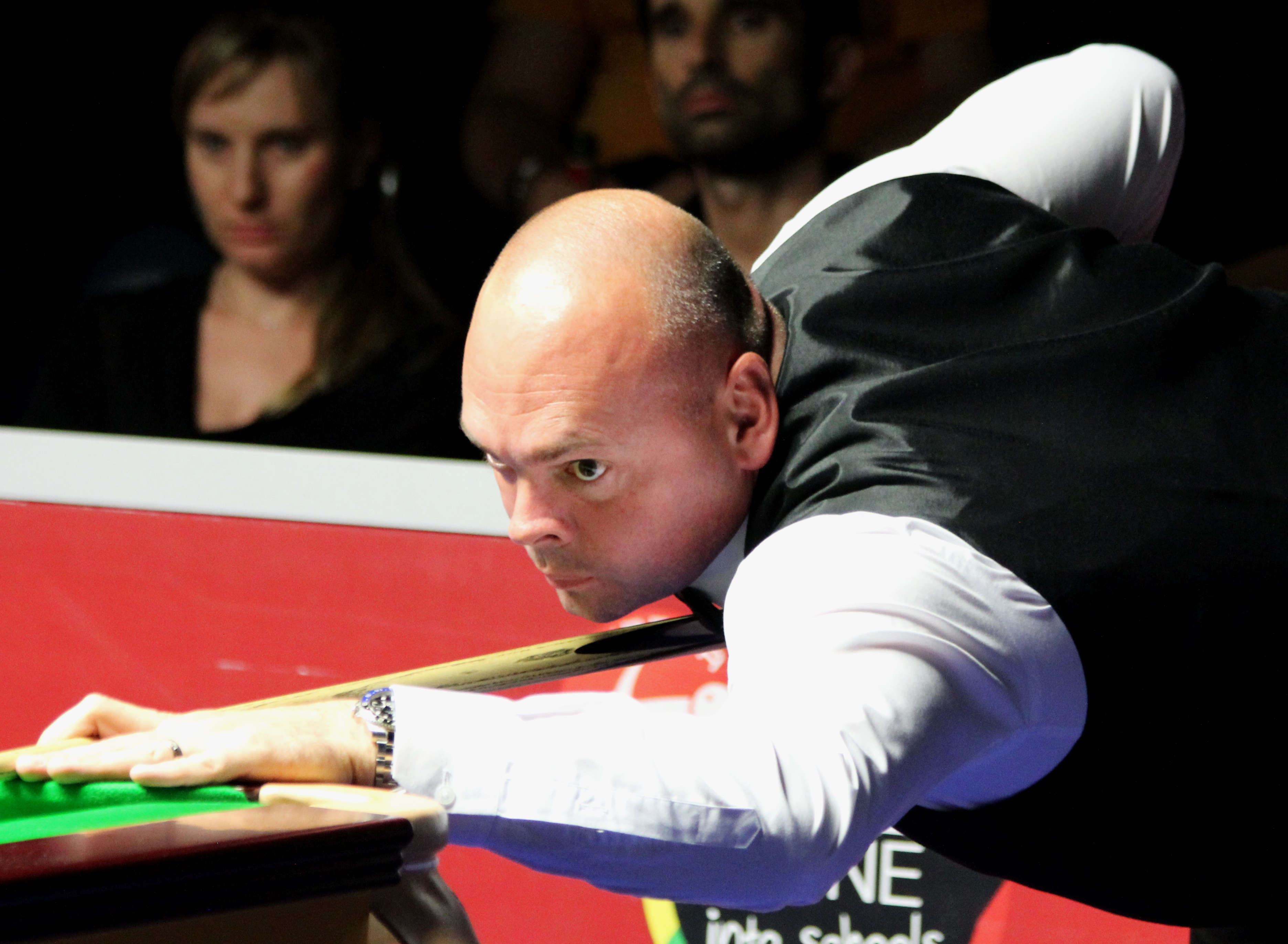 Stuart Bingham beim Paul Hunter Classic 2016